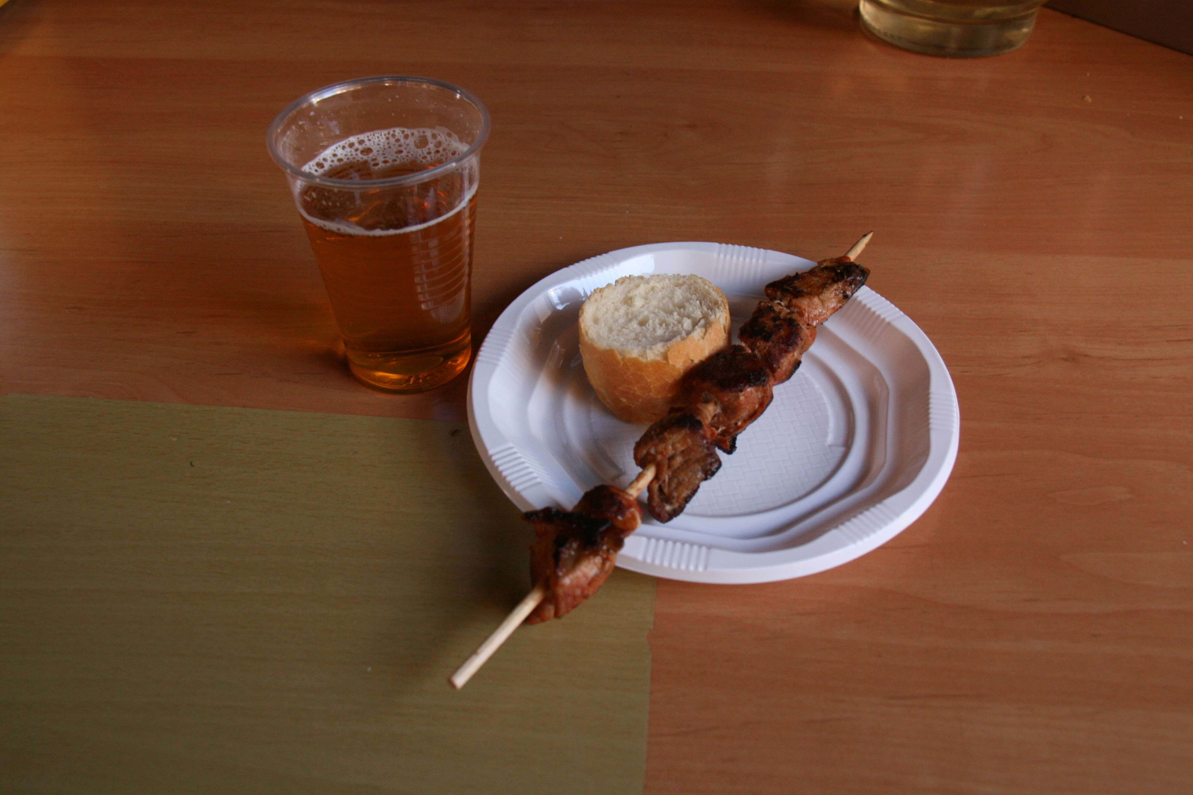 Pincho moruno - (Tapa de la feria de Valladolid - Fiestas de San Lorenzo - 2009)